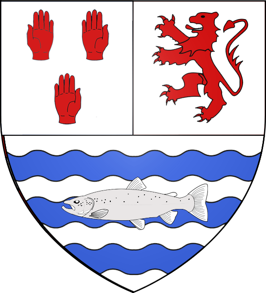 O'Melaghlin-MacLaughlin